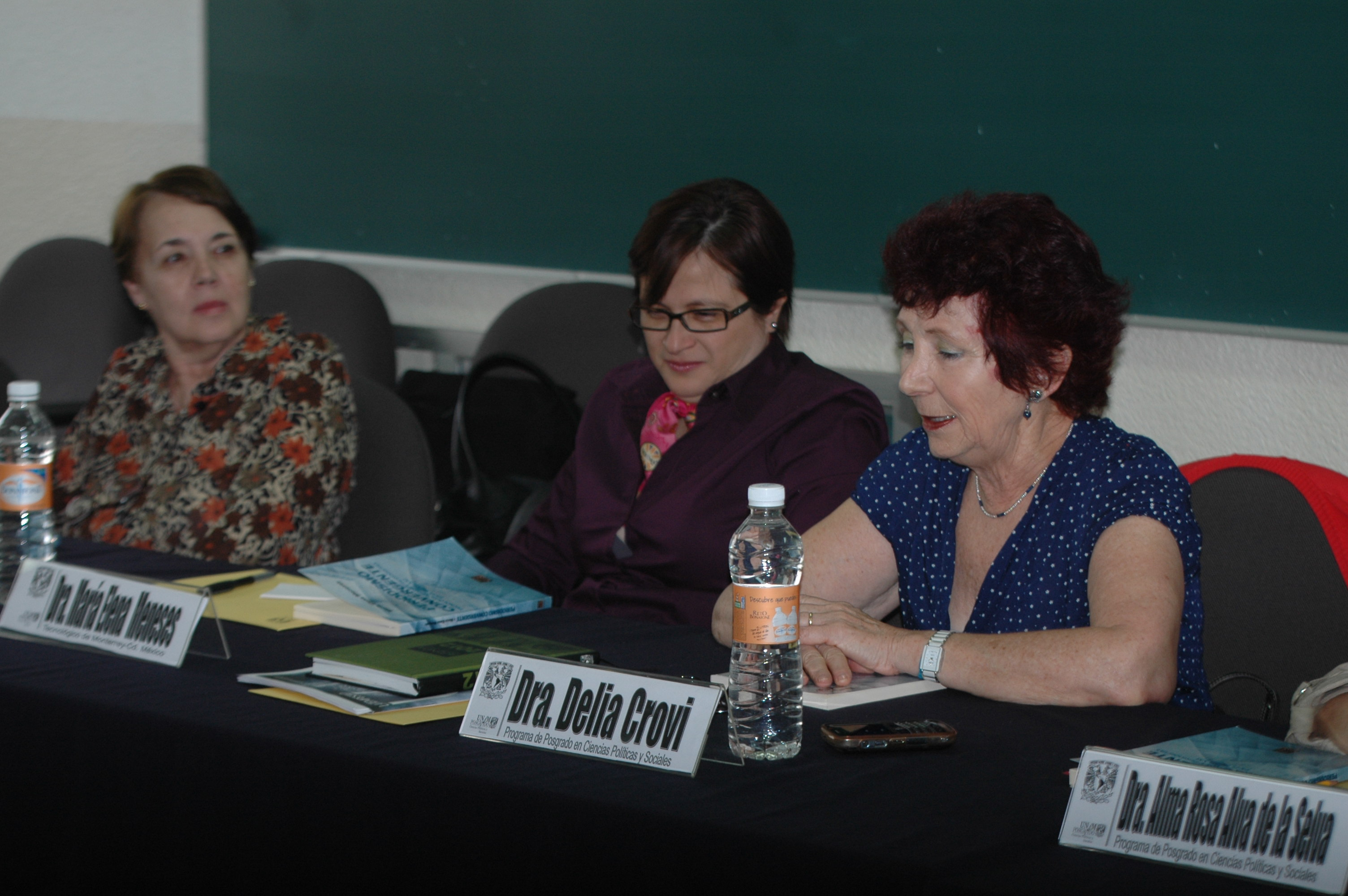 1 Foro sobre seguridad con Dra. Susana Gonzalez, Dra. María Elena Meneses y Dra. Delia Crovi